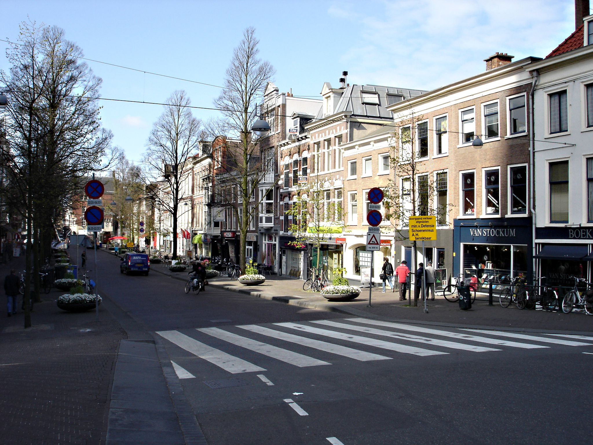 Opname van Herengracht te Den Haag